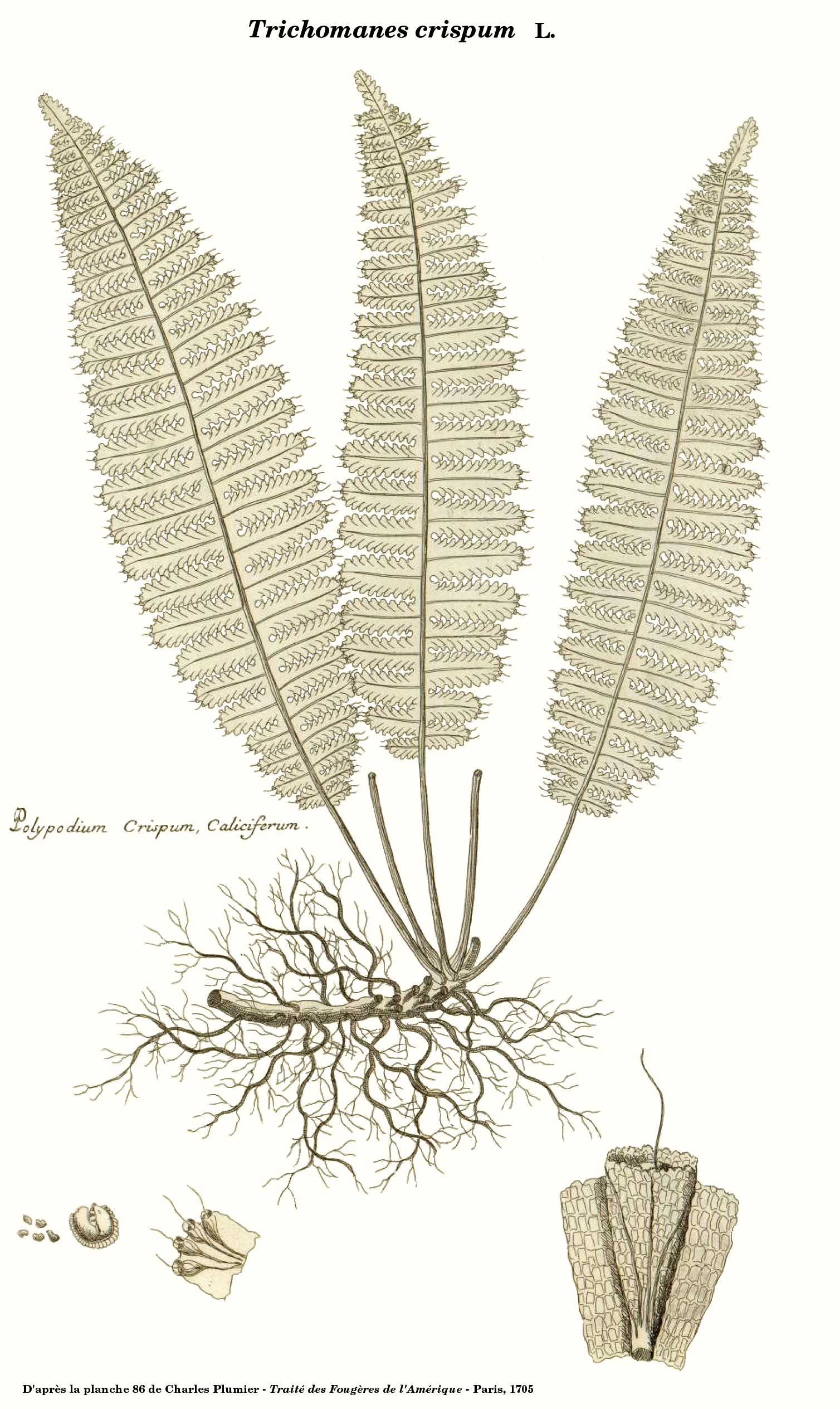 Trichomanes crispum (Polypodium crispum caliciferum) : planche n° 88 de Charles Plumier - Traité des fougères de l'Amérique - Paris, 1705 - Planche reprise sous Gimp par Denis Prévôt